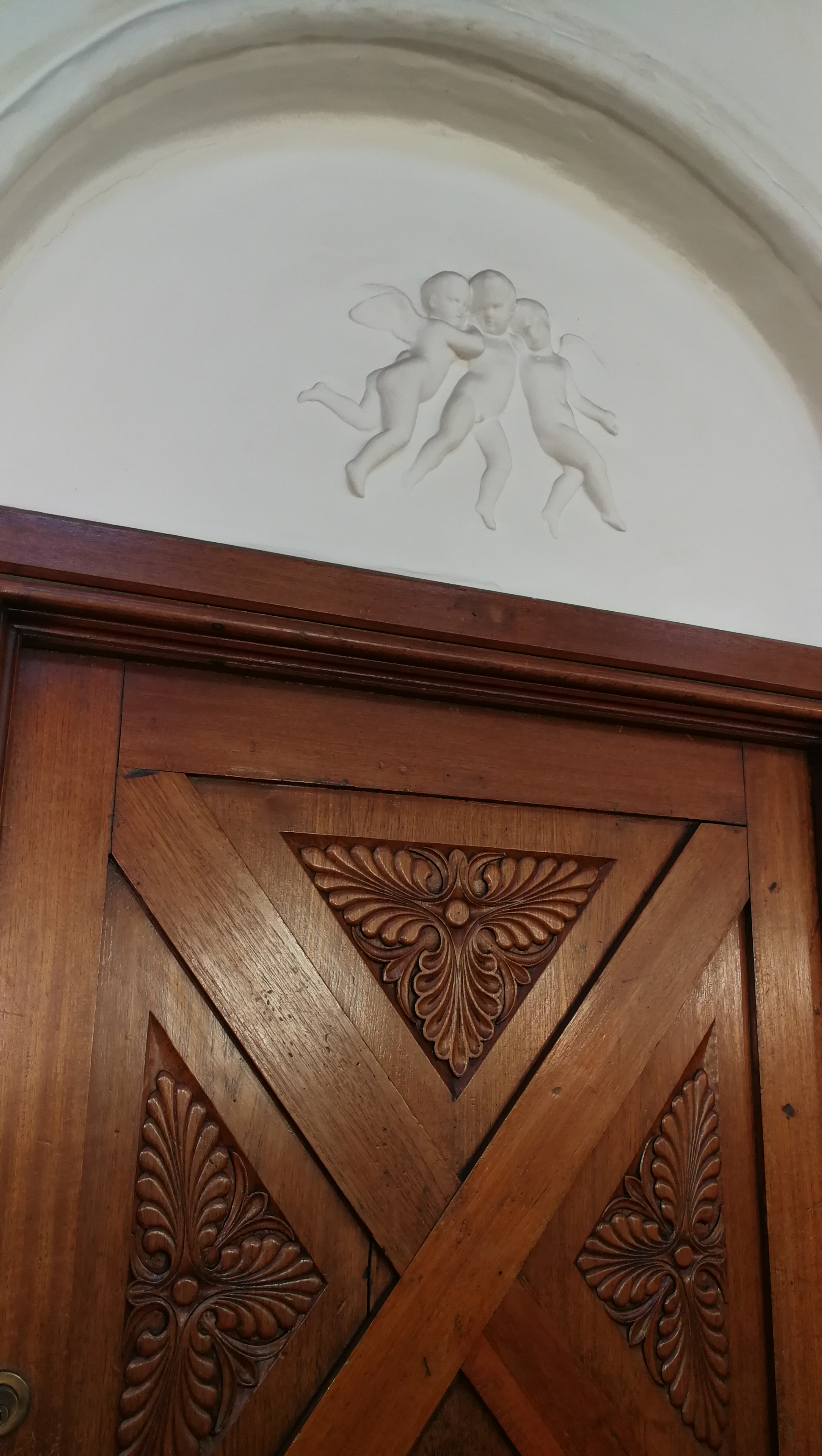 Bygningskulturens Hus